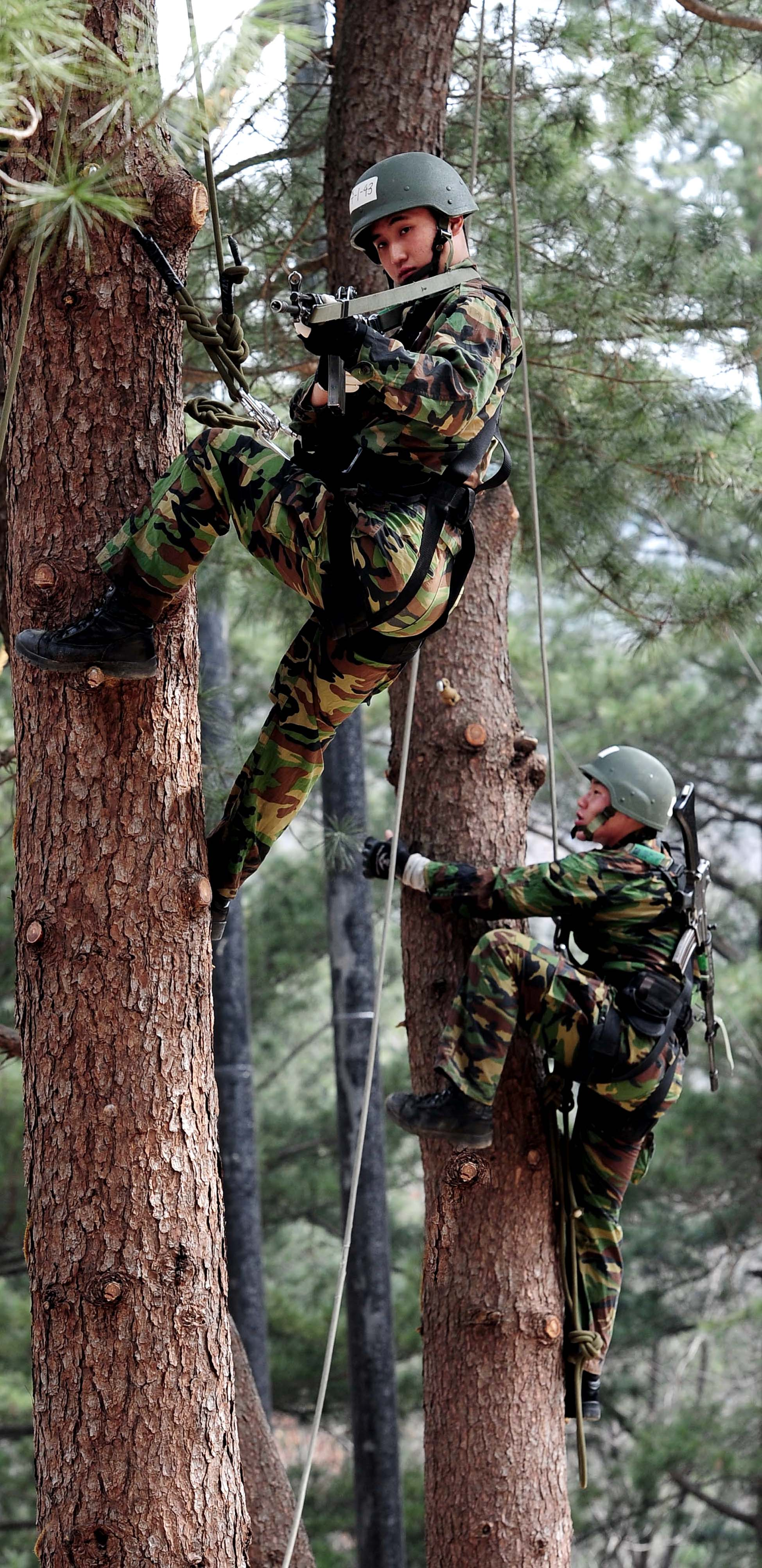 육군 수도기계화보병사단 기갑수색대대 장병들이 26일 맹호유격장에서 유격훈련 중 나무오르기를 하고 있다. 이 종목은 관측이 제한되는 지형에서 원거리 관측 및 사격을 가능케 하는 훈련이다. 또한 5미터 높이 나무를 제한된 시간 내에 오르게 하는 능력도 배양하기 위해 실시되고 있다. 촬영 - 이헌구 기자